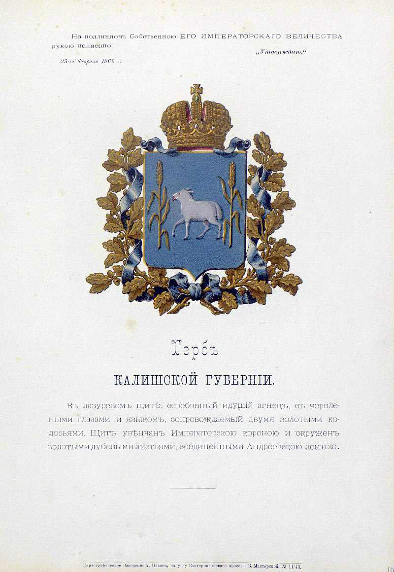 Official Russian Empire coat of arms Kalish Governorate. Герб Российской Империи Калишской губернии с официальным описанием в Гербовнике Бенке. Утверждён Императором Всероссийским Александром Вторым.